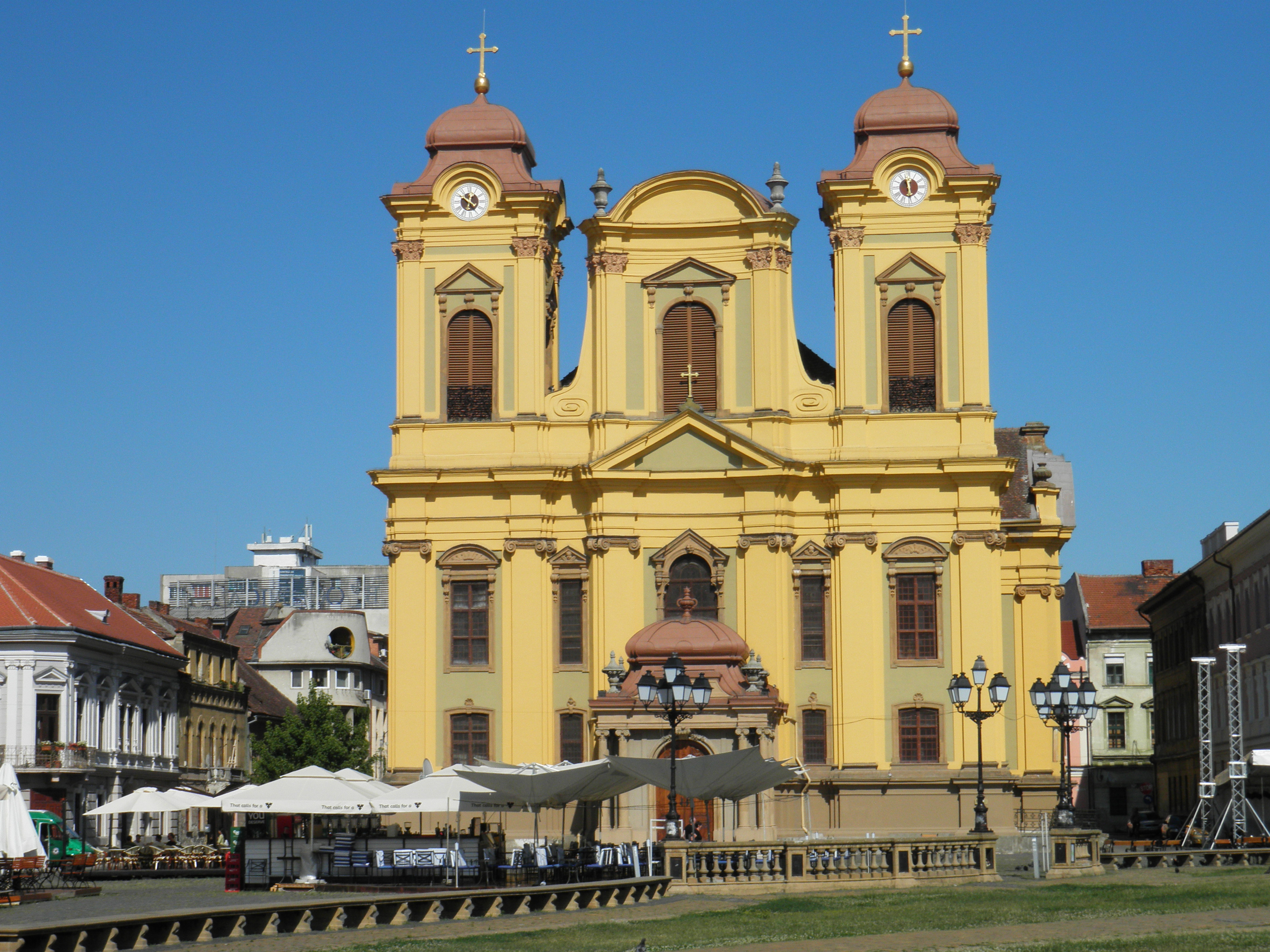 Piata Unirii - Domul Romano Catolic Sfântul Gheorghe